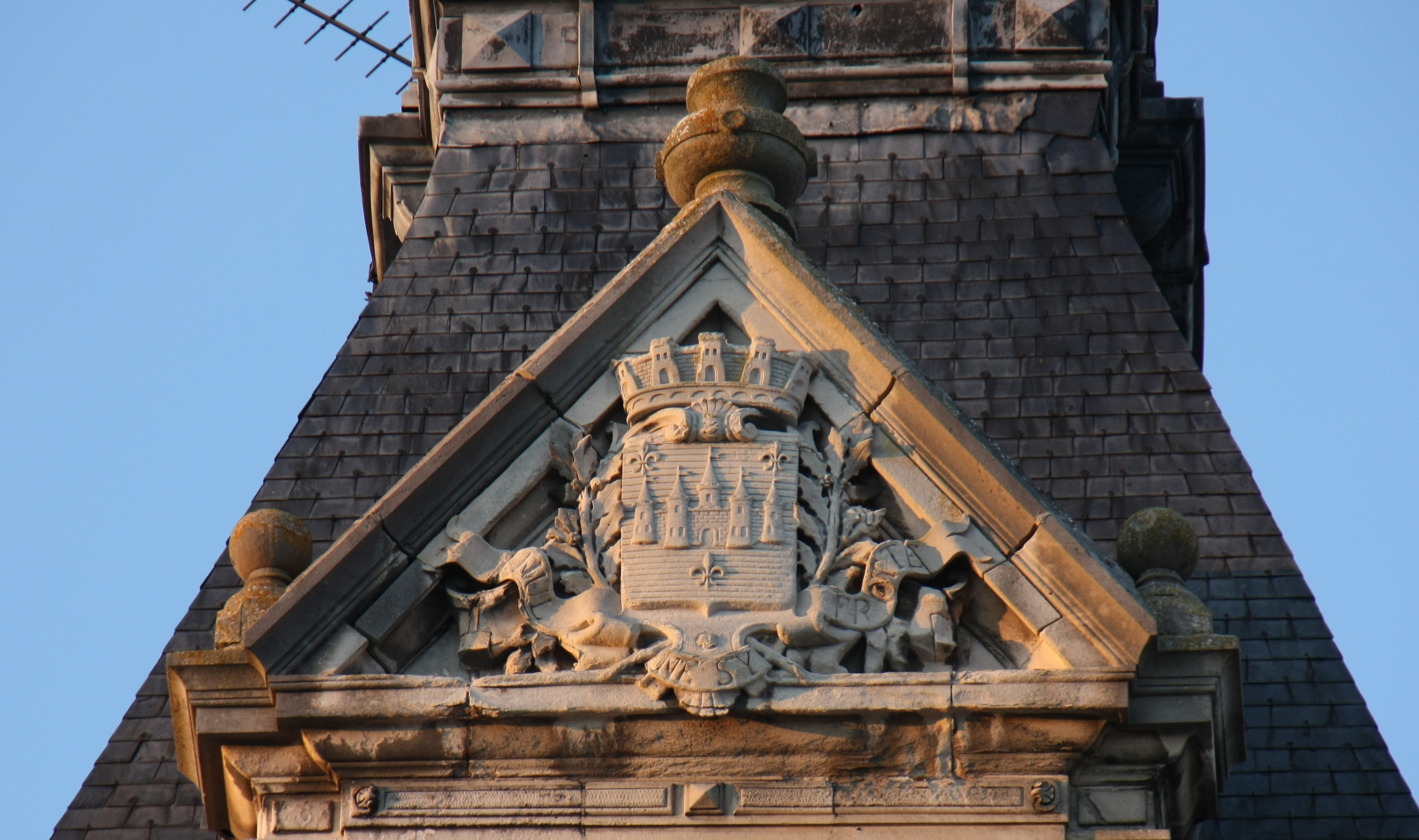 Les armoiries et la devise de la ville sur le fronton de l'Hôtel de Ville de Château-Thierry.